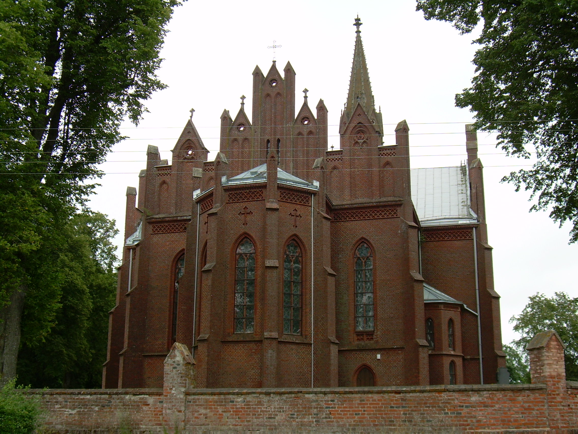 Šateikių Šv. evangelisto Morkaus bažnyčia